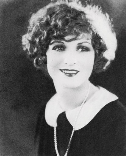 Helen Lynch